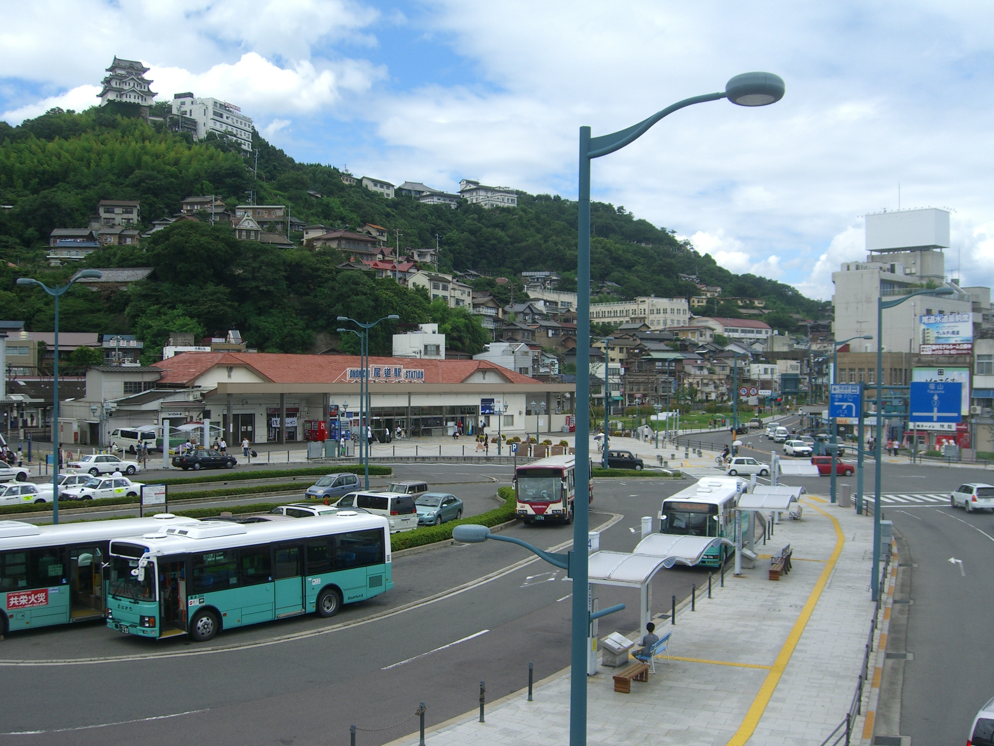 連絡歩道橋から見た尾道駅前ロータリー